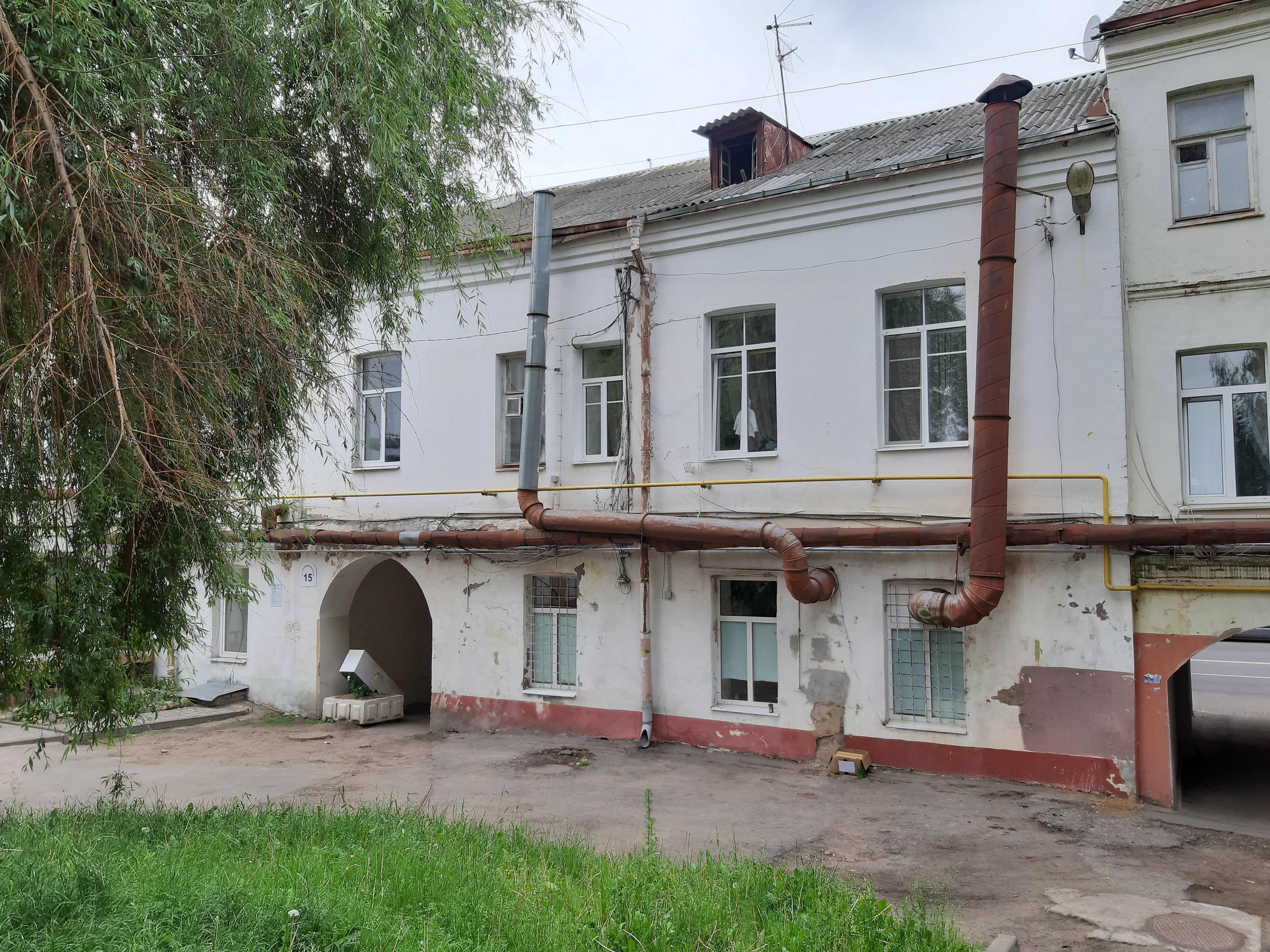 Магілёў у 2019 г.